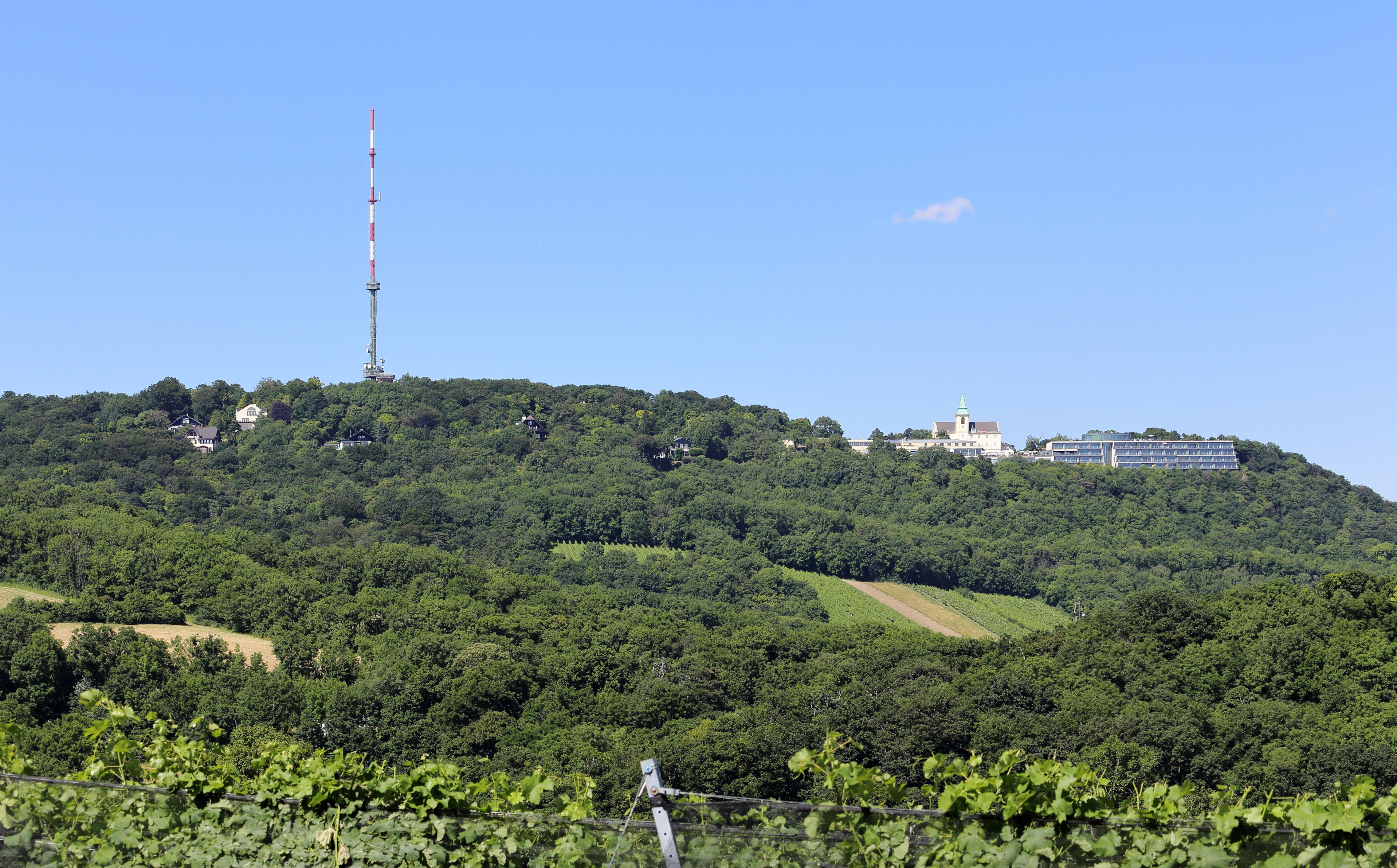 Südwestansicht (vom Cobenzl) der Gipfelregion des 484 Meter hohen Kahlenberges im 19. Wiener Gemeindebezirk Döbling.Links der 165 Meter hohe und 1974 errichtete Mast des Senders Kahlenberg. Vor der Josefskirche links die Modul University Vienna (Start mit Wintersemester 2007/2008) und das Suite'Hotel und rechts das Austria Trend Hotel Kahlenberg mit Luxus-Suiten sowie "Langzeitaufenthalte"-Arpartments (Fertigstellung 2007).